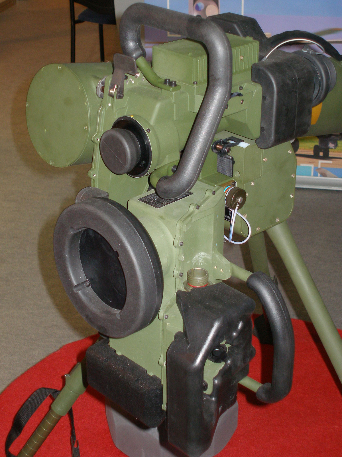 Wyrzutnia pocisków p.panc Spike.